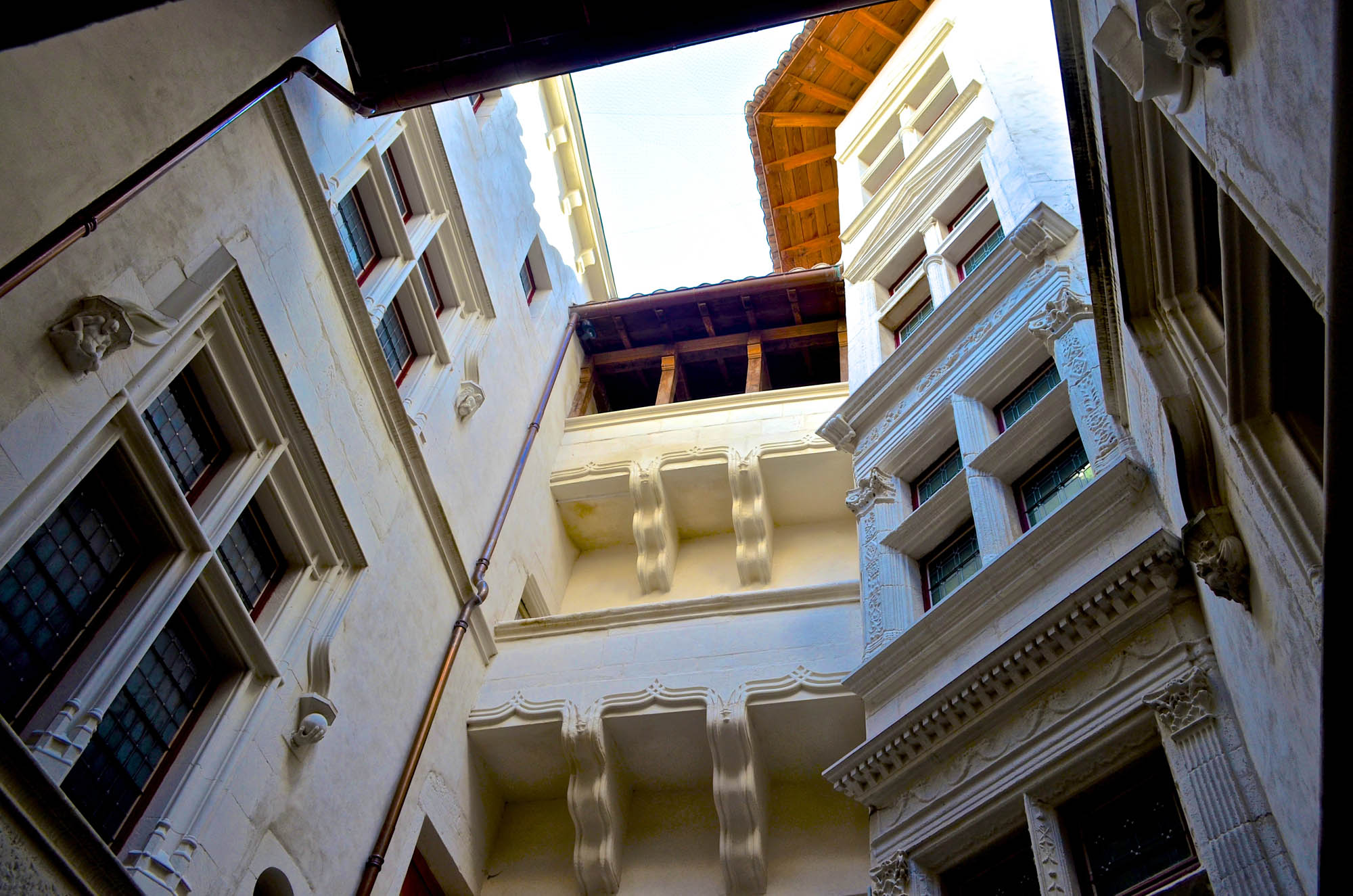 Maison Dupré-Latour à Valence (Drôme, France), XVIe s. Cour intérieure.